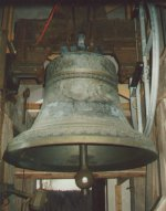 Stora kyrkklockan i Lits kyrka